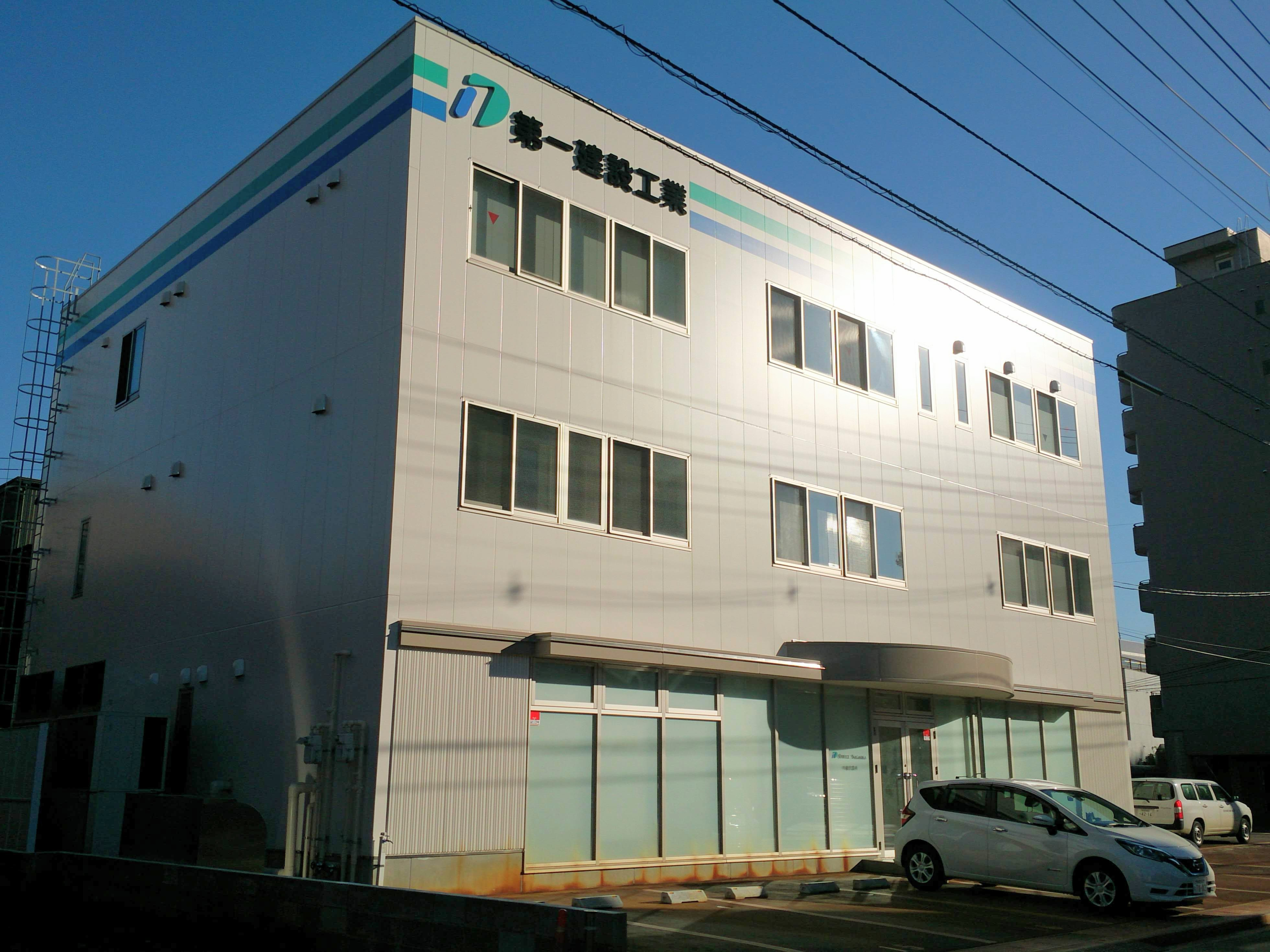 第一建設工業株式会社 新社屋 長岡